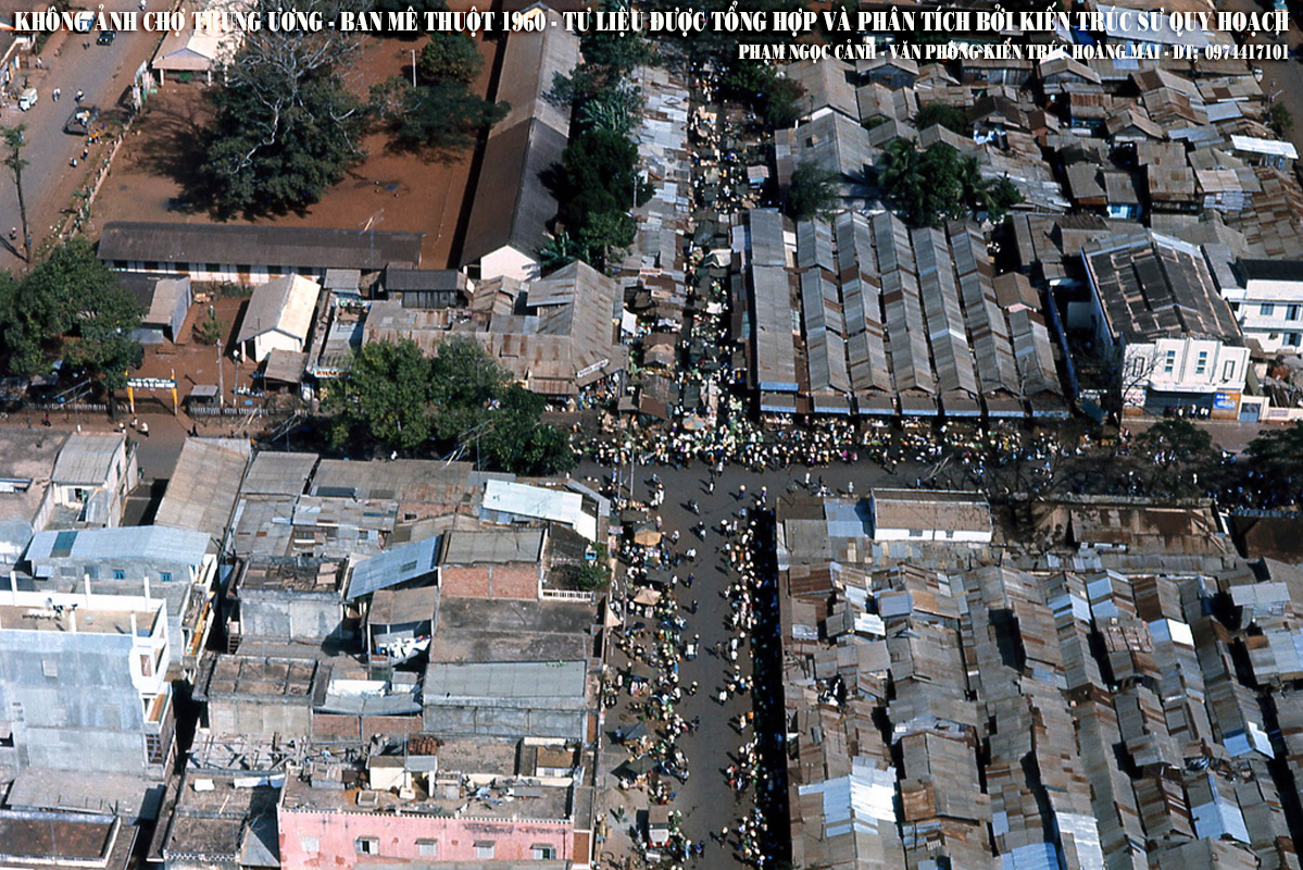 Không ảnh chụp Chợ trung ương Buôn Ma Thuột chụp năm 1969